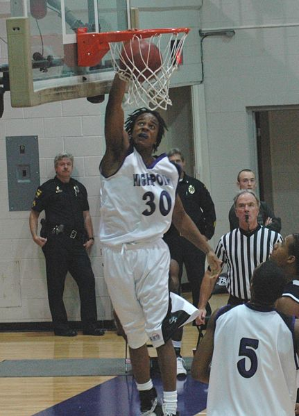 Arizona Reid, jugador de baloncesto estadounidense